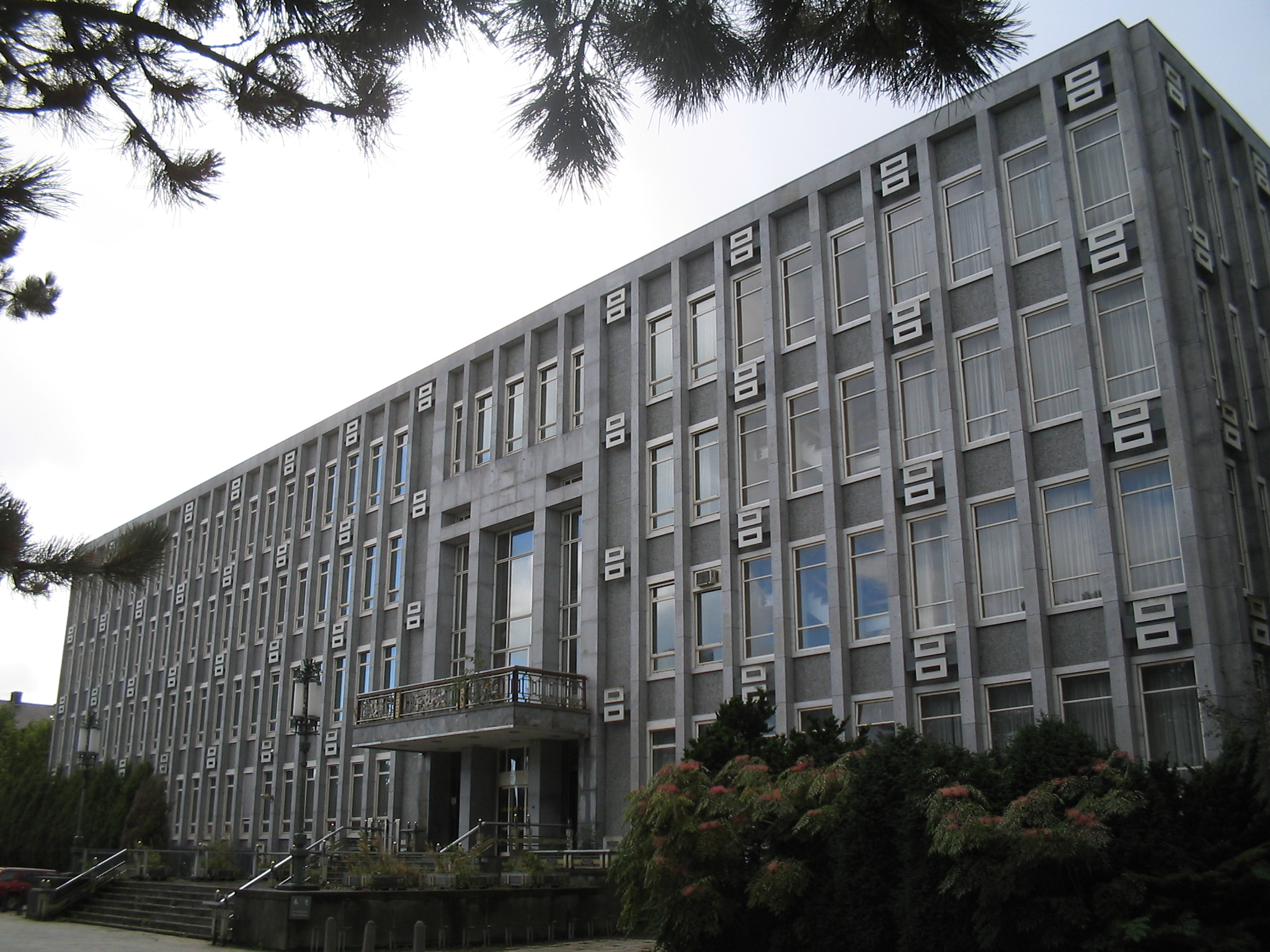 Old townhall / Oude gemeentehuis van Rijswijk, 2 oktober 2005